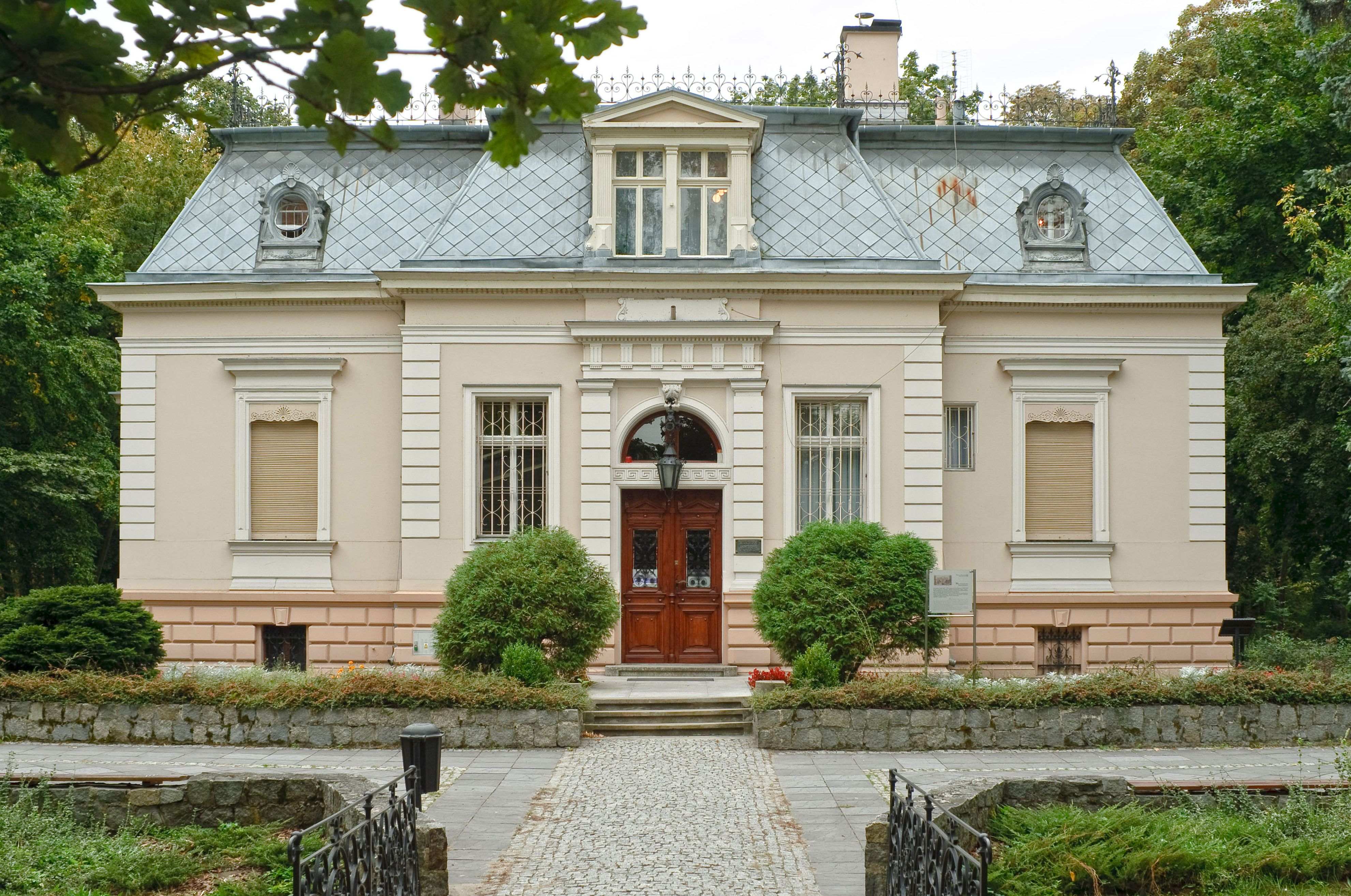 Żyrardów, zespół pałacowy Dittricha, ul. Dittricha 1 pałacyk, ob. muzeum (zabytek nr rejestr. 727)